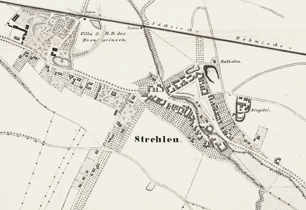 Plan von Dresden (1863) Ausschnitt der Gegend um das Dorf Strehlen, die gesamte Kartenansicht in einem anderen Exemplar ist verfügbar unter